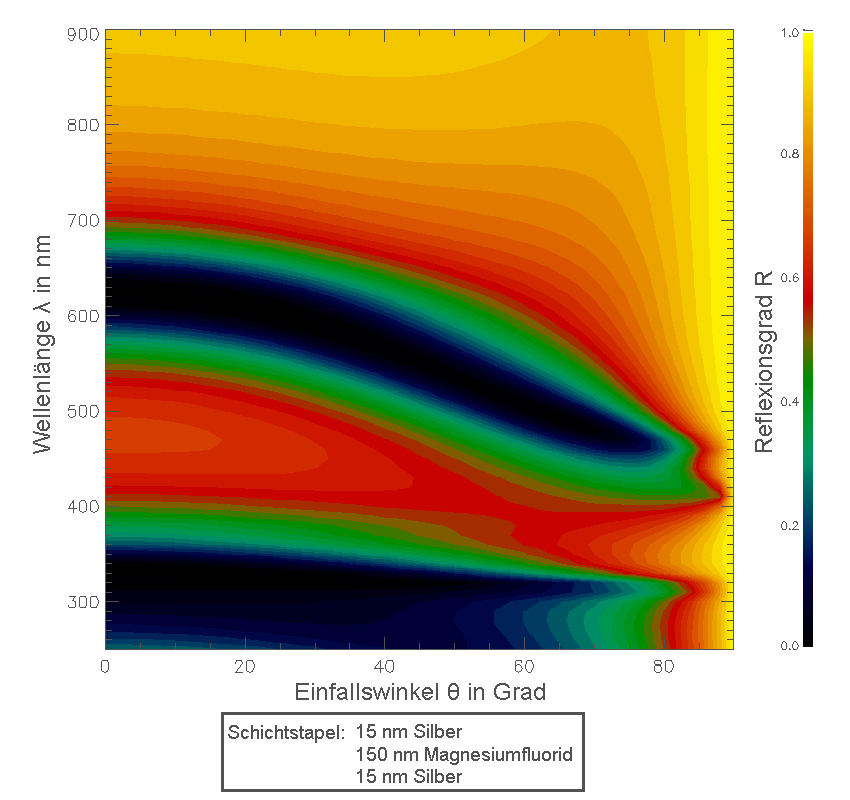 Reflexionsgrad in Abhängigkeit vom Einfallswinkel und der Wellenlänge (sichtbares Licht) für einen Schichtstapel aus 15 nm Silber / 150 nm Magnesiumfluorid / 15 nm Silber